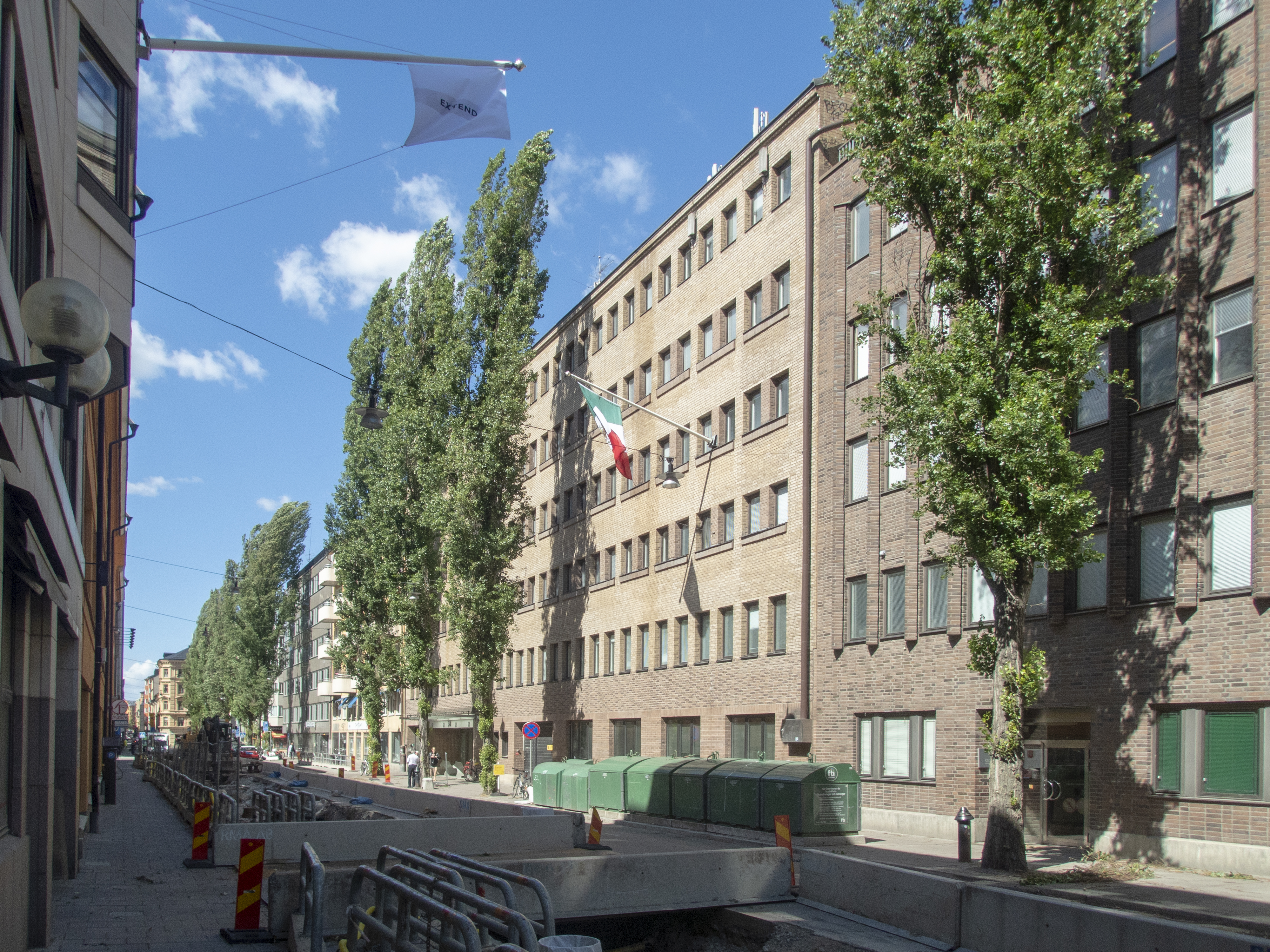 Oxen Mindre 30 Luntmakargatan 34 Stockholm. Nybyggnadsår 1979 - 1987 AB Mälarhus (Byggherre) Hans Borgström Arkitektkontor AB (Arkitektkontor)